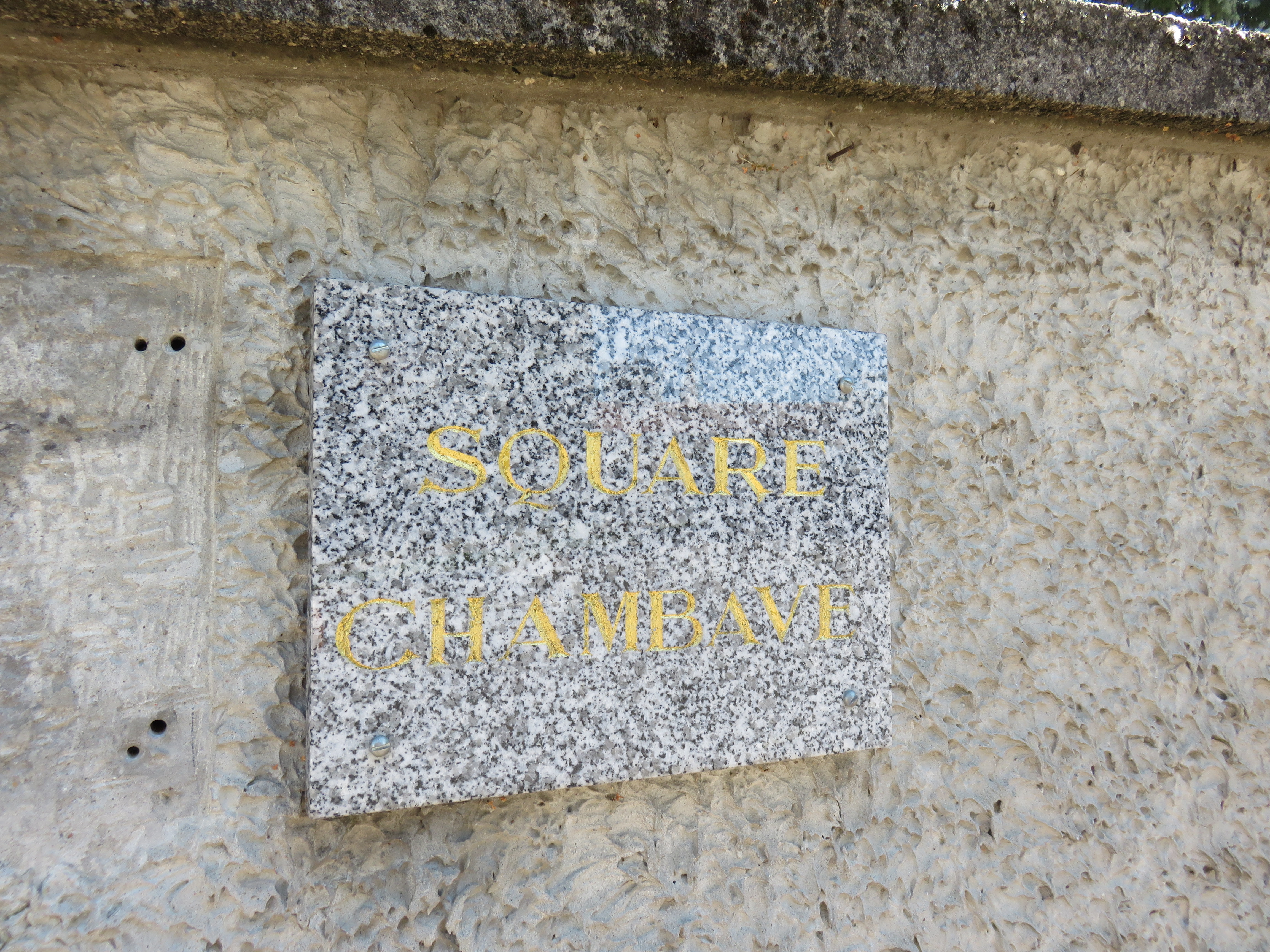 Plaque du square Chambave à Saint-Laurent-de-Mure (Rhône, France).